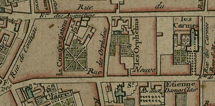 Plan de la ville de Reims, dédié et présenté au Roy à l'occasion de son sacre par son très humble, très obéissant et très fidèl sujet, Dom Coutans, Bénédictain de St Maur.